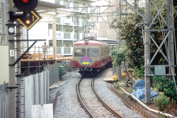 西武鉄道351系赤電車 国分寺駅多摩湖線旧ホームより撮影 向こう側に現在のホームが見えるのに注意 引退記念ヘッドマークを装着し、国分寺駅へ入線する355編成。 多摩湖線旧ホームから撮影されたもので、画像左側には建設中の現行ホームが確認できる。